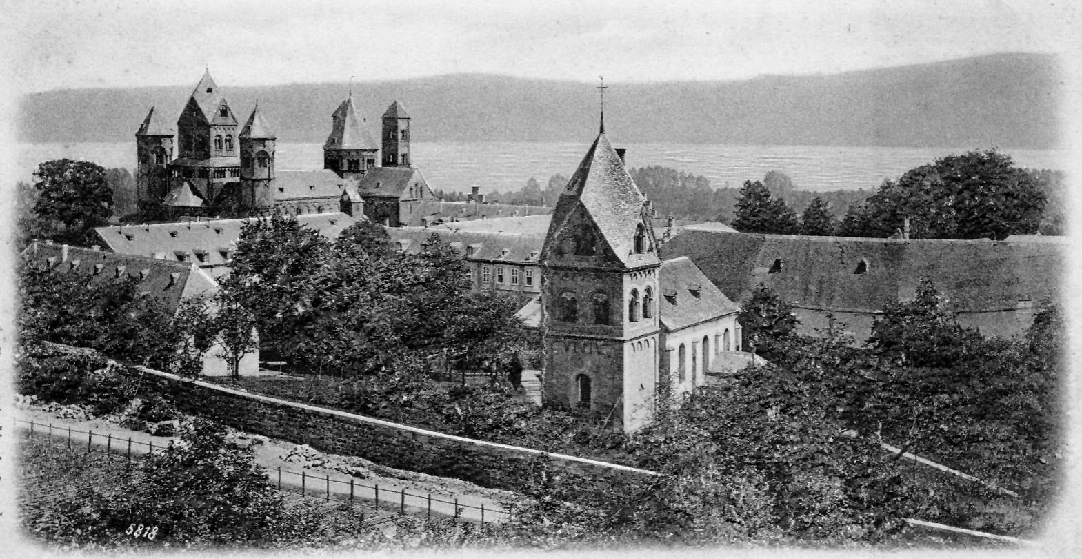 Blick auf Maria Laach um 1900